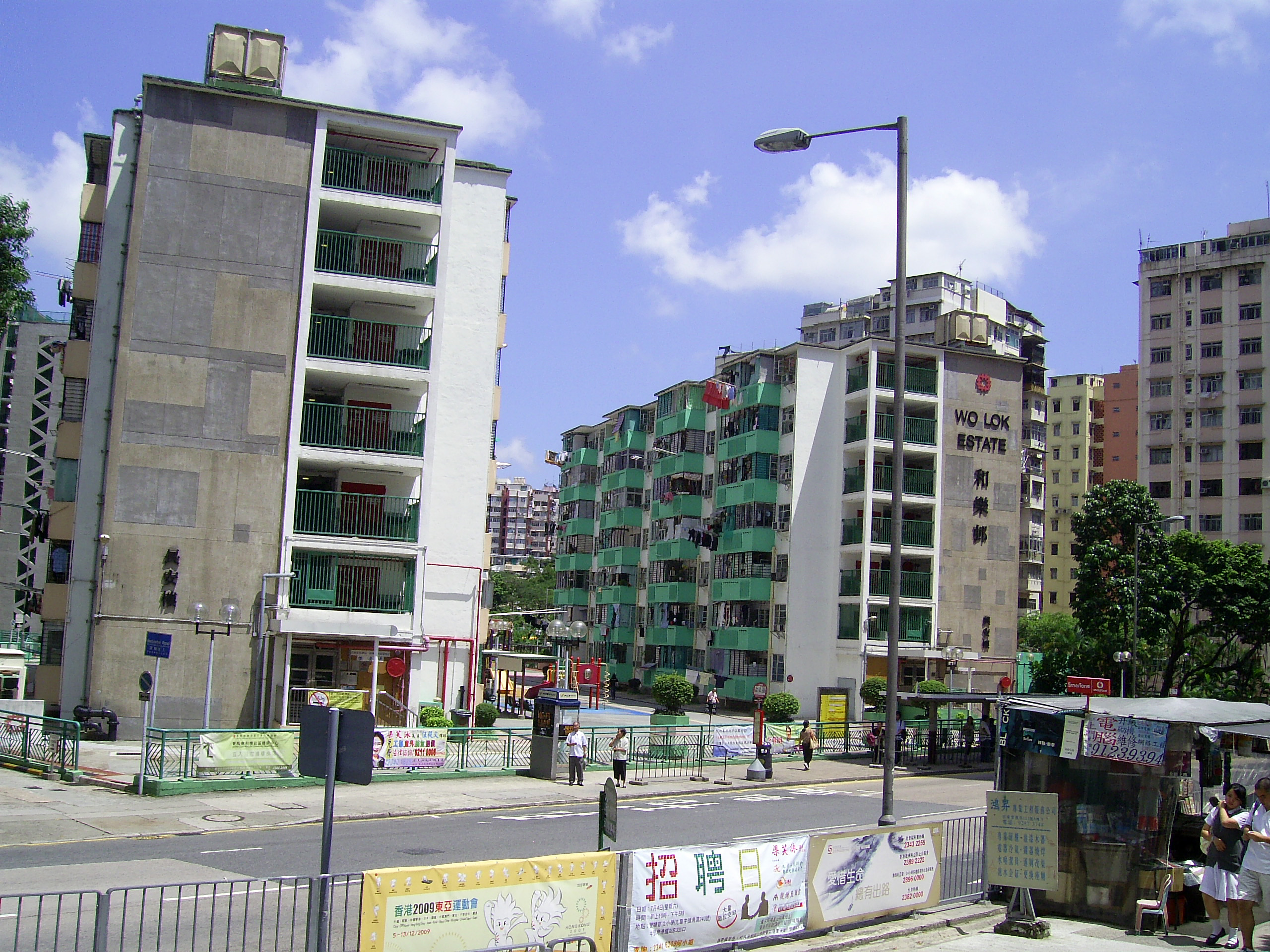 中文（香港）: 和樂邨